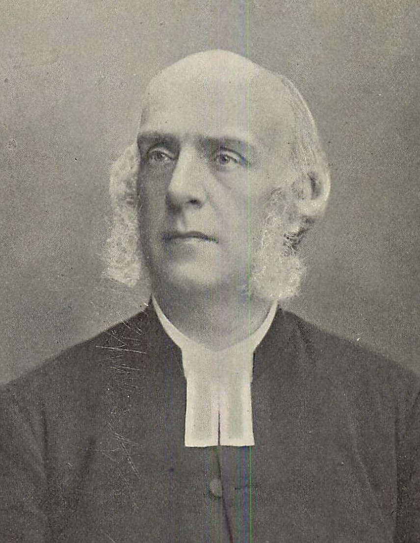 Karl Bernhard Filonegros Wadström (1831-1918), svensk präst, författare och samlare